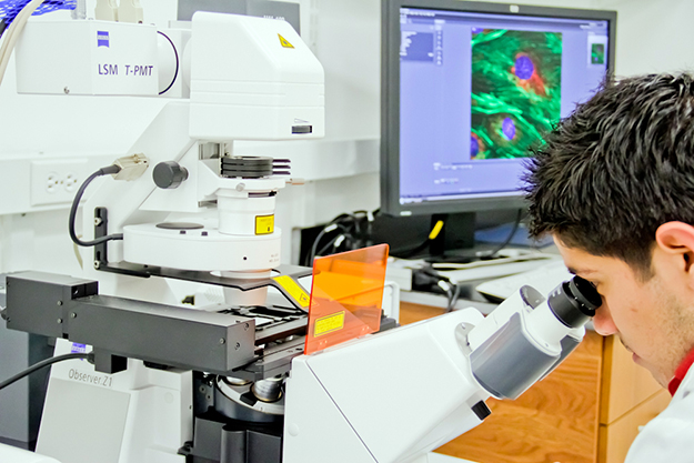 Unidad de Bio-imagen del Centro de Investigación y Desarrollo en Ciencias de la Salud. El estado de Nuevo León